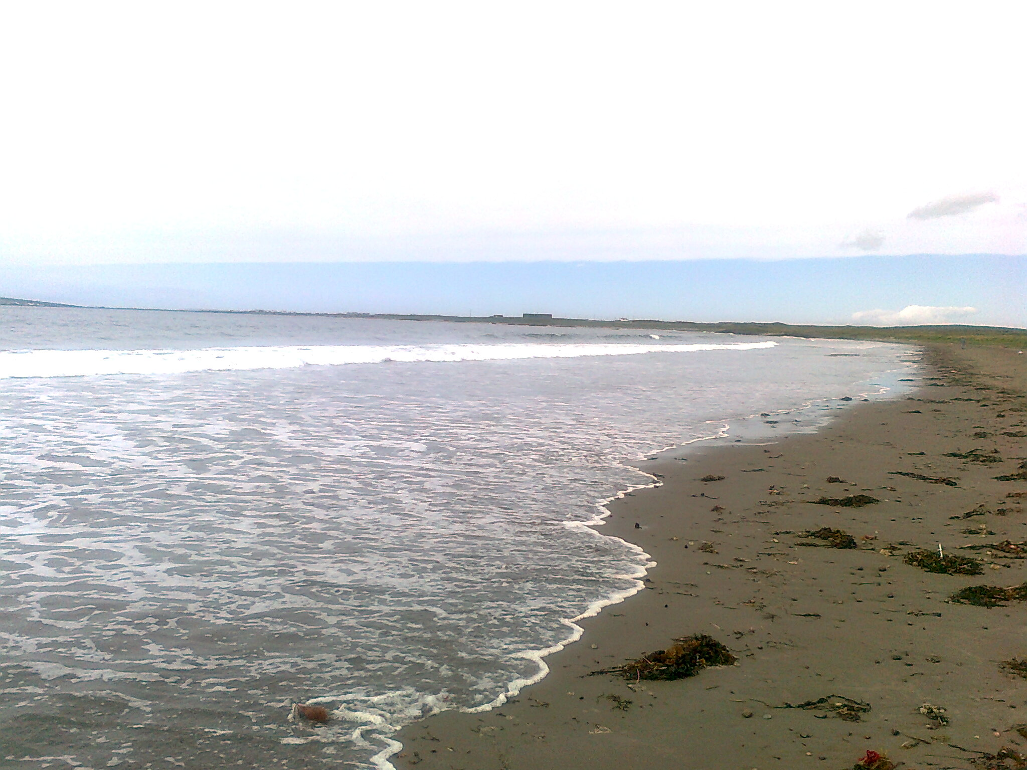 Point Au Gaul